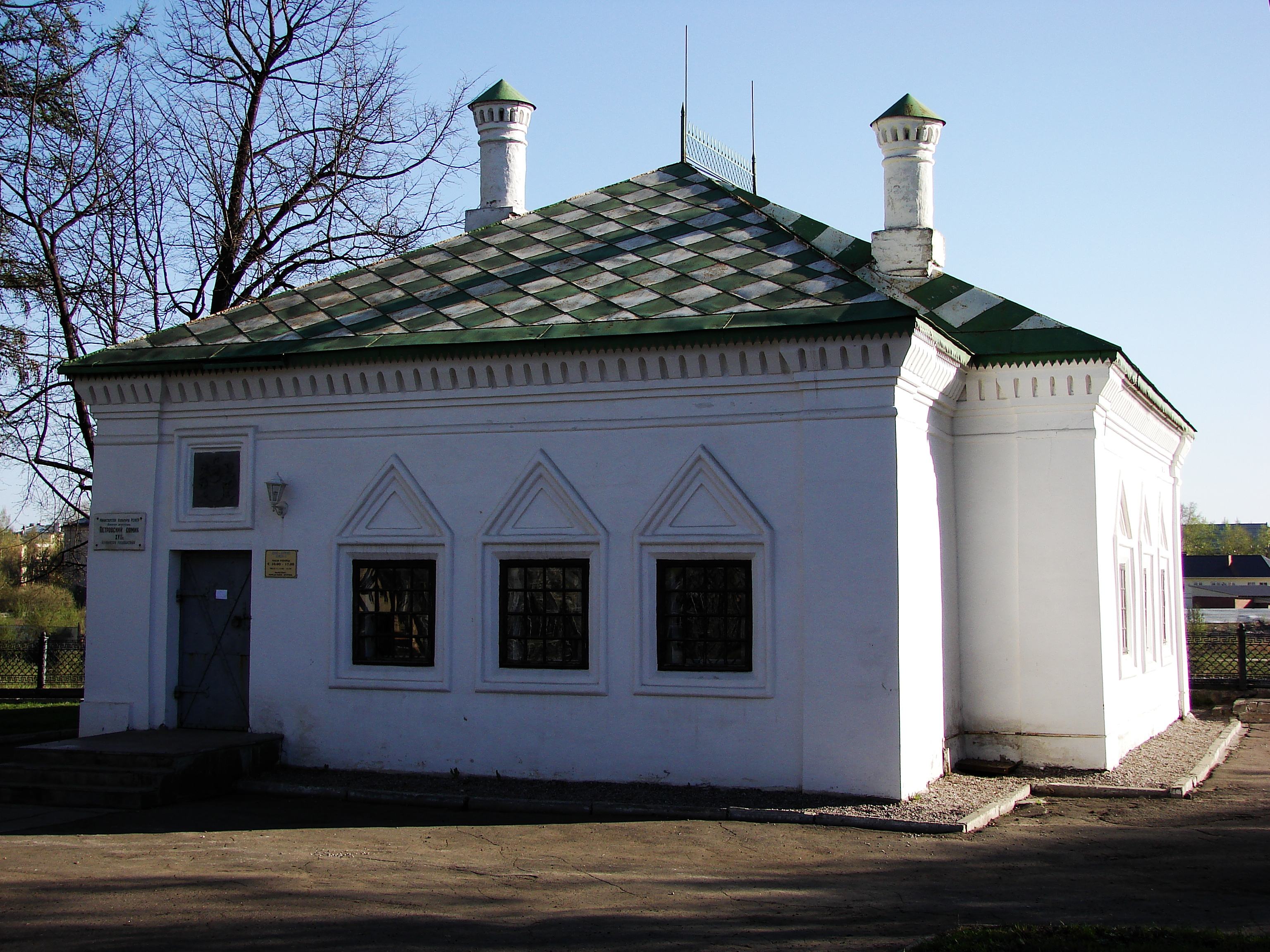 Домик Петра Первого в Вологде